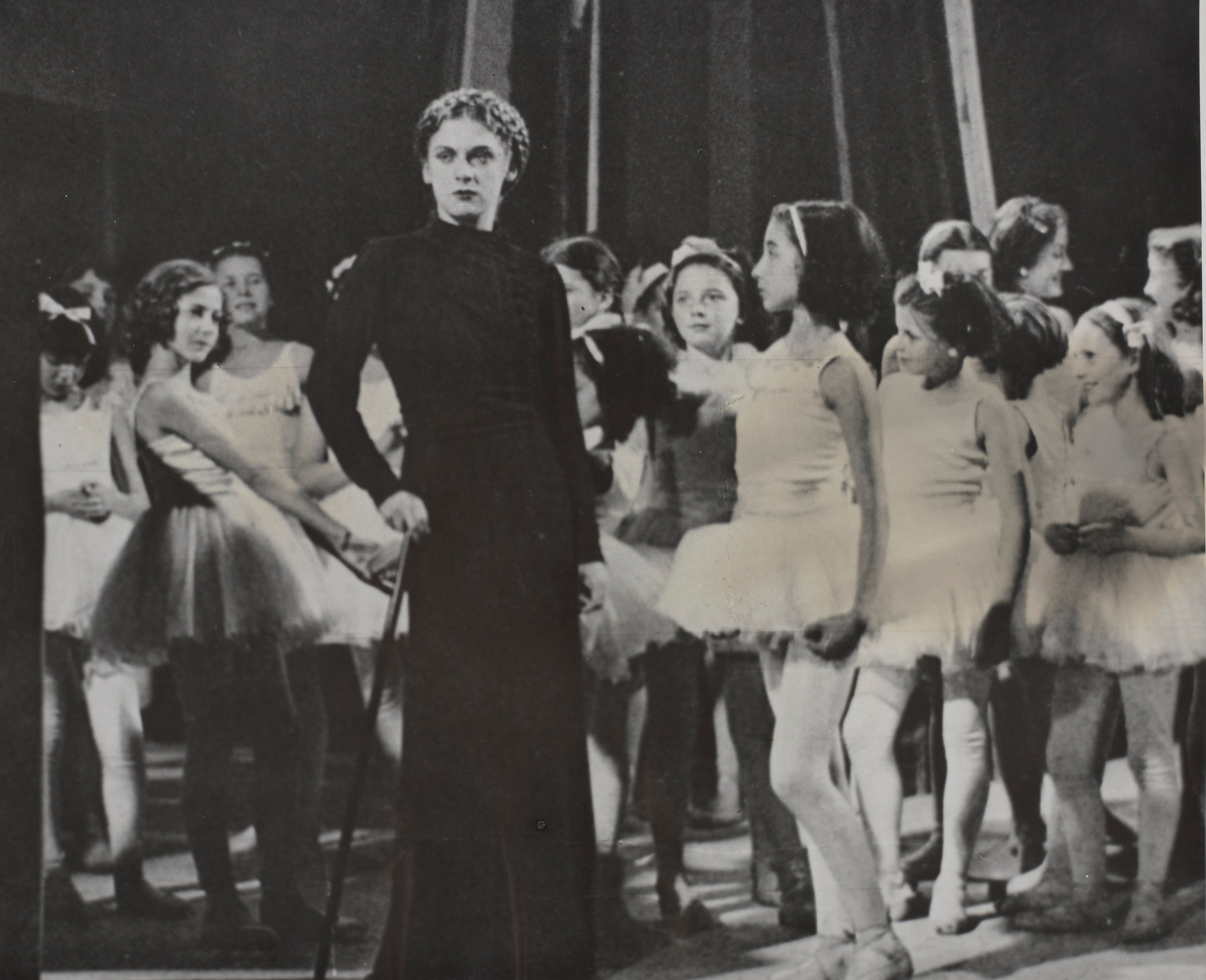 Mia Slavenska